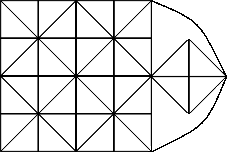 虎棋棋盤的一種。